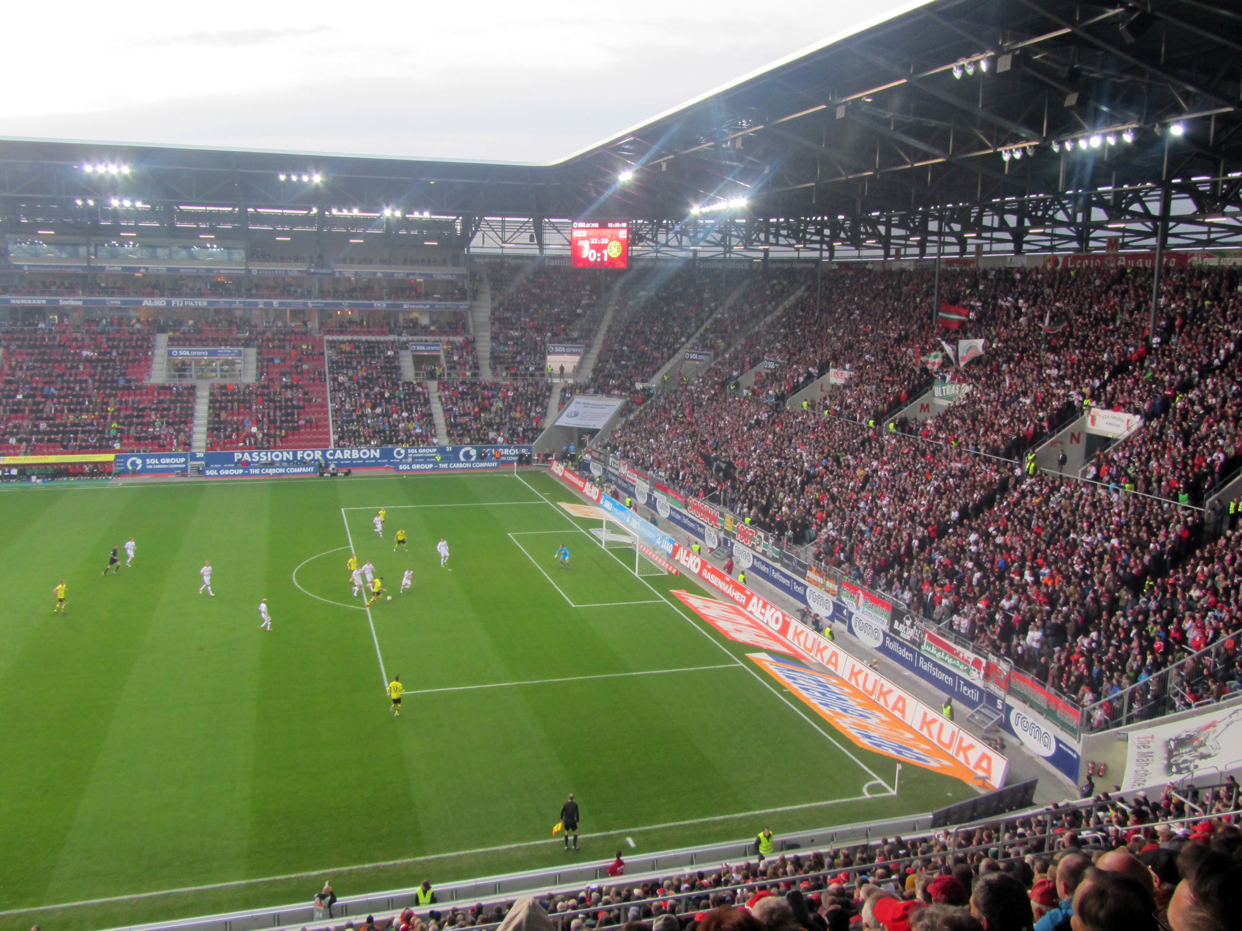 2012-11-10, SGL Arena FC Augsburg - Borussia Dortmund 1:3 (Bundesliga)